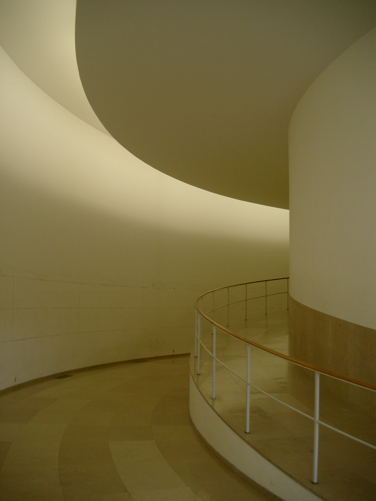 Deskribapena Oportoko ARkitektura eskola, Oporto (Portugal), arkitektoa: Alvaro Siza Vieira Iturburua nik neuk hartua Sortze Data 2003-04-23 Argazkilaria josugoni Aldaketak ez